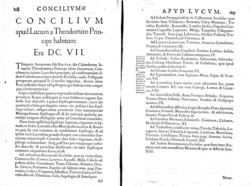 Loaisa (1593) - Texto latino do Concilio de Lugo (a. 569)